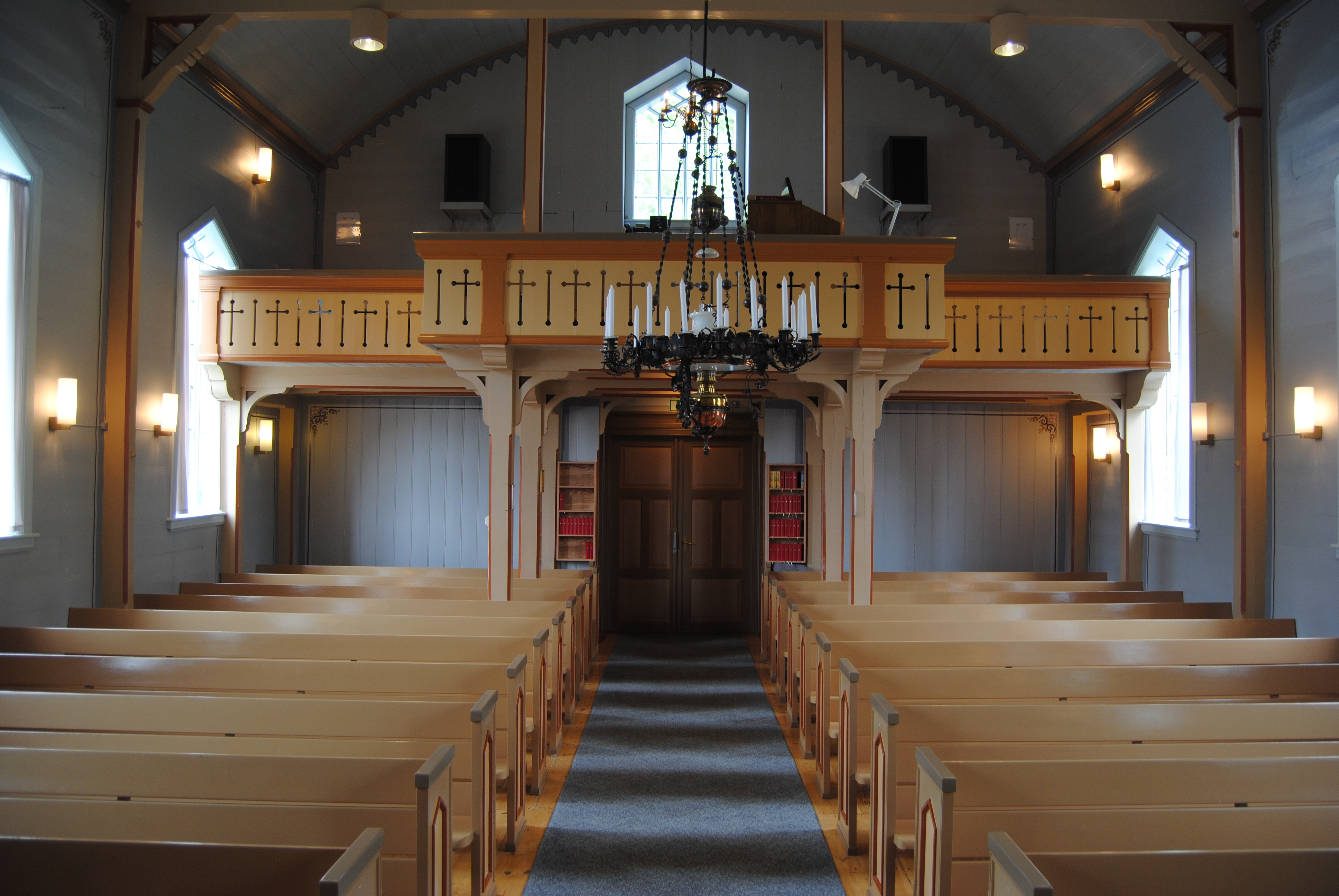 Vike kapell sett bakover frå koret